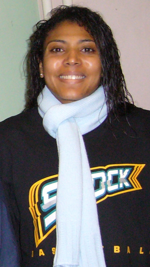 Photo de la joueuse brésilienne de basket-ball Claudia Das Neves.The brazilian basketball player Claudia Das Neves.